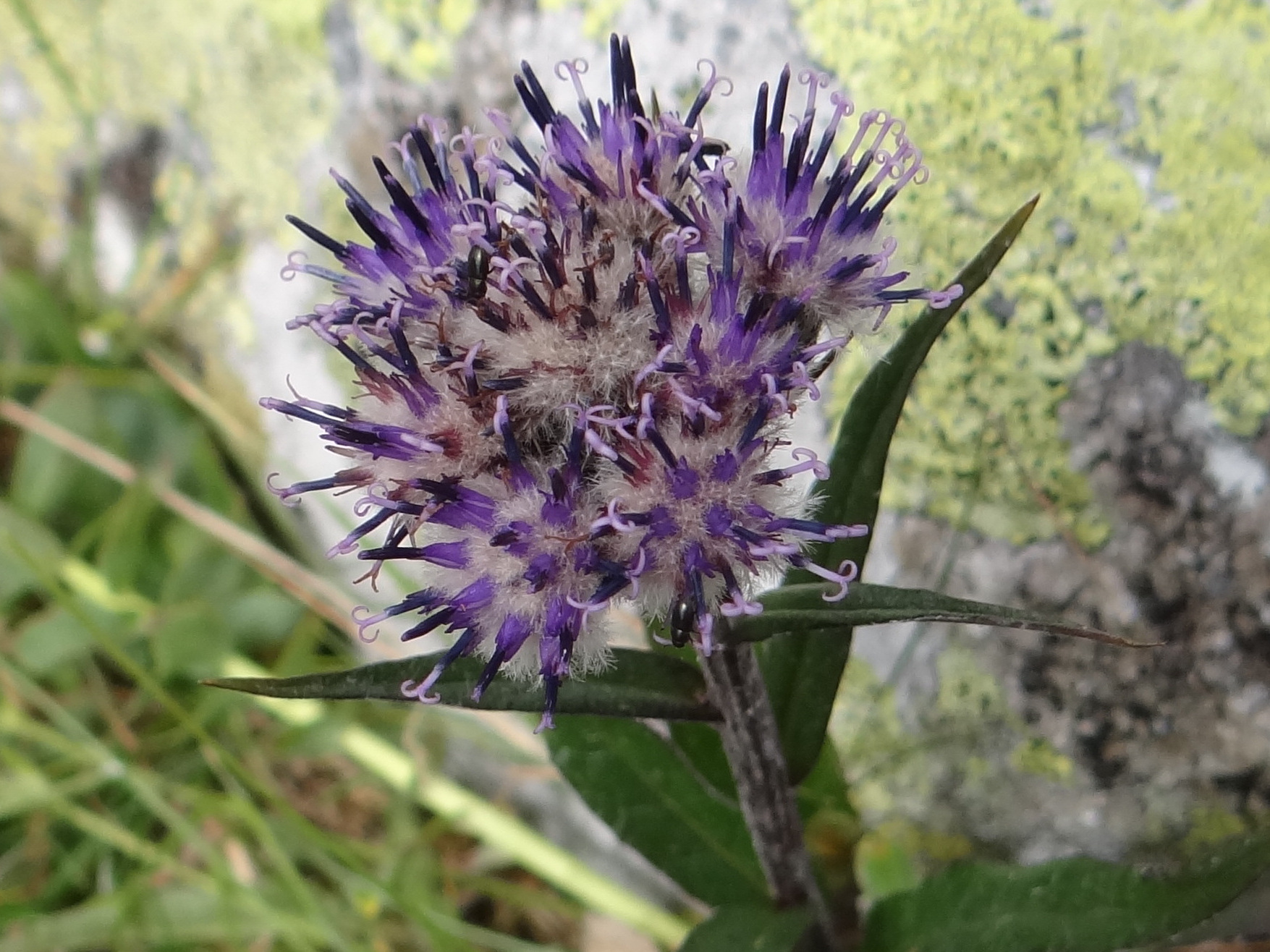 Une saussurée des Alpes (Saussurea alpina) dans la vallée de Mlynicka, dans les hautes montagnes des Tatras en Slovaquie.